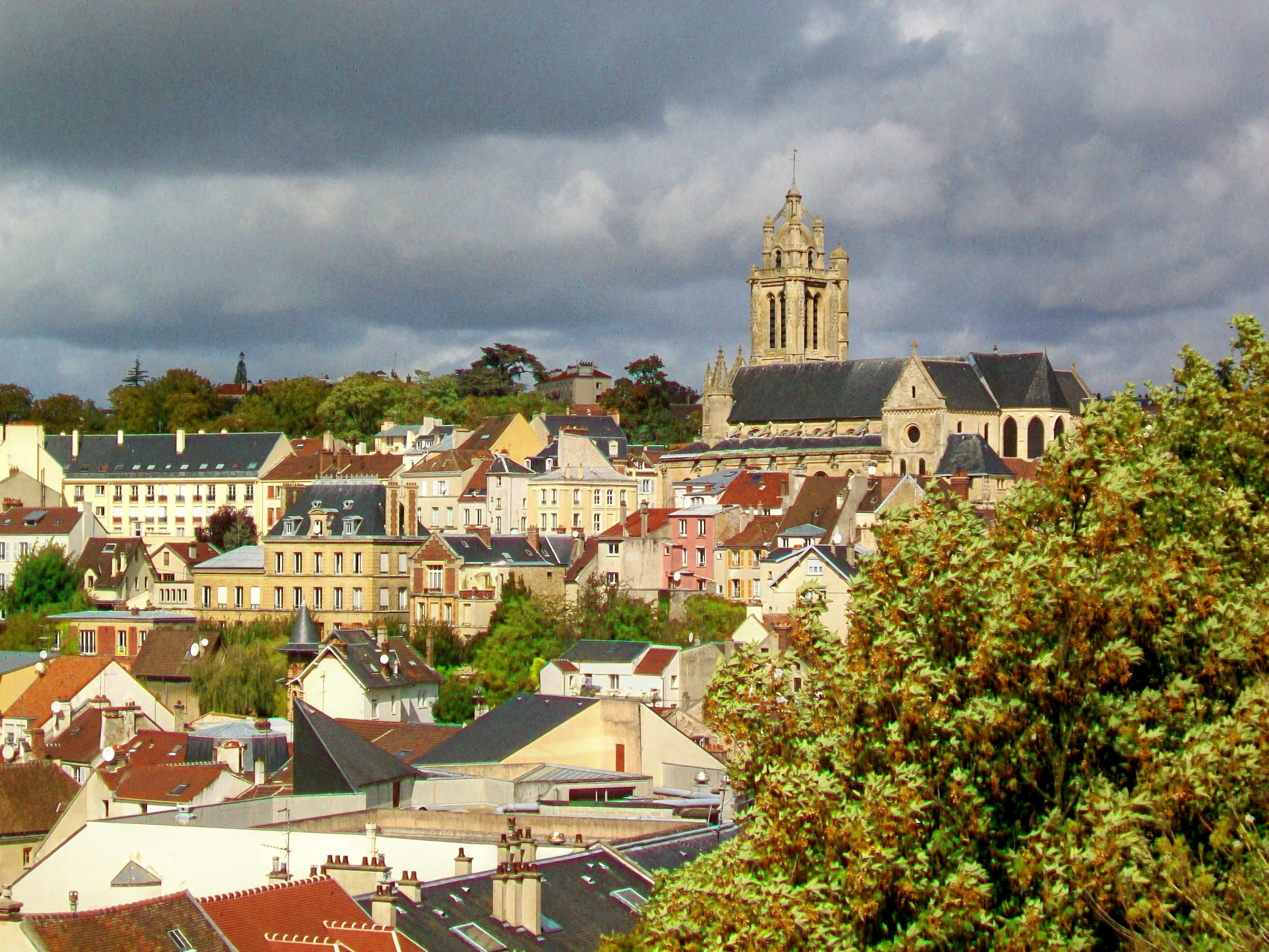 Vue sur la cathédrale Saint-Maclou depuis le Jardin des Cinq Sens, sur le promontoire du château.